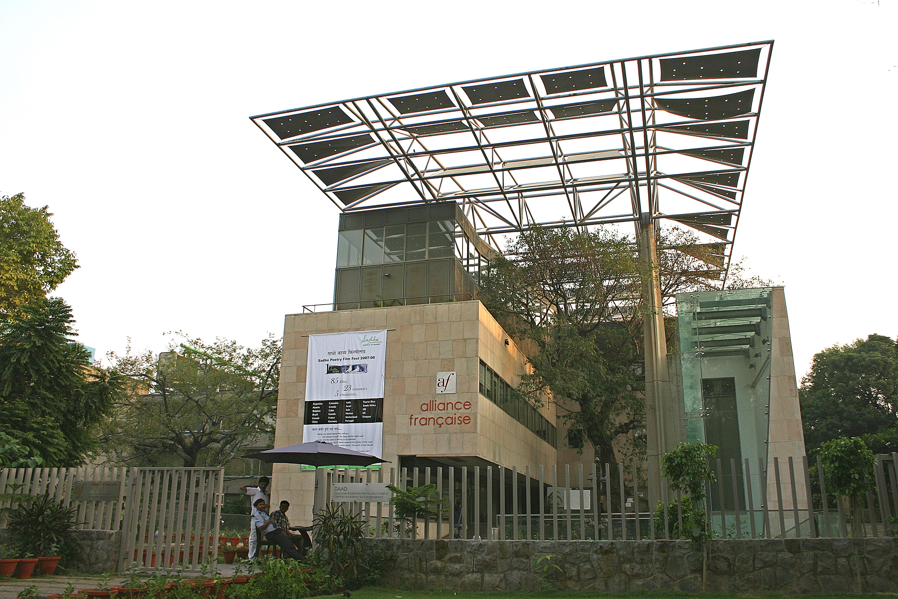 Bâtiment de l'Alliance Française de Delhi, entrée principale